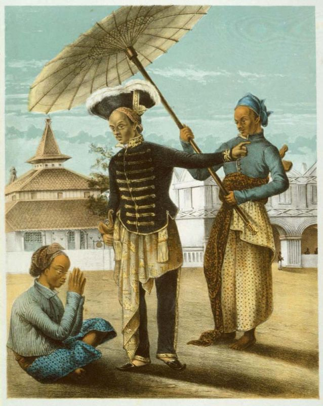 Litho. Litho naar een oorspronkelijke tekening van A. van Pers. Linksonder: Pangerang (prins) van Madura. Middenonder: Javaanse tekst. Rechtsonder: Pangerang (prince) à Madura. Linksonder: A. v. Pers del. Rechtsonder: Kl. lith. v. C. W. Mieling.. Pangerang (prins) van Madura